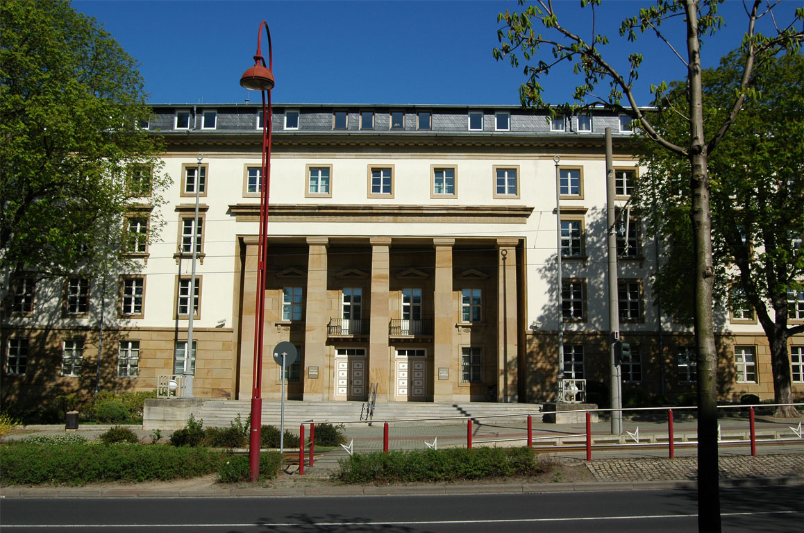 Thüringer Landtag (errichtet zwischen 1936 und 1937), in der Arnstädterstraße in Erfurt